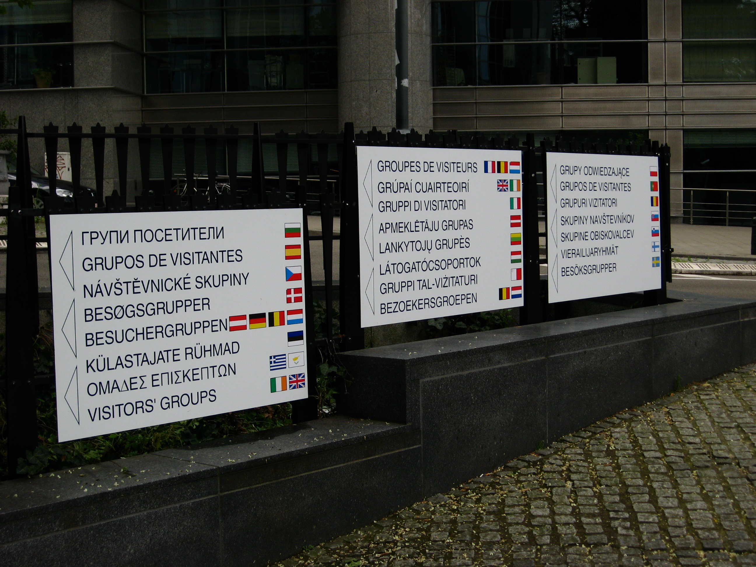 Mångspråkiga skyltar utanför Europaparlamentet i Bryssel.